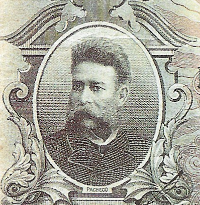 Efigie del Dr Pacheco que se muestra en el Billete de 20 Pesos de los Bancos Nacionales Garantidos.